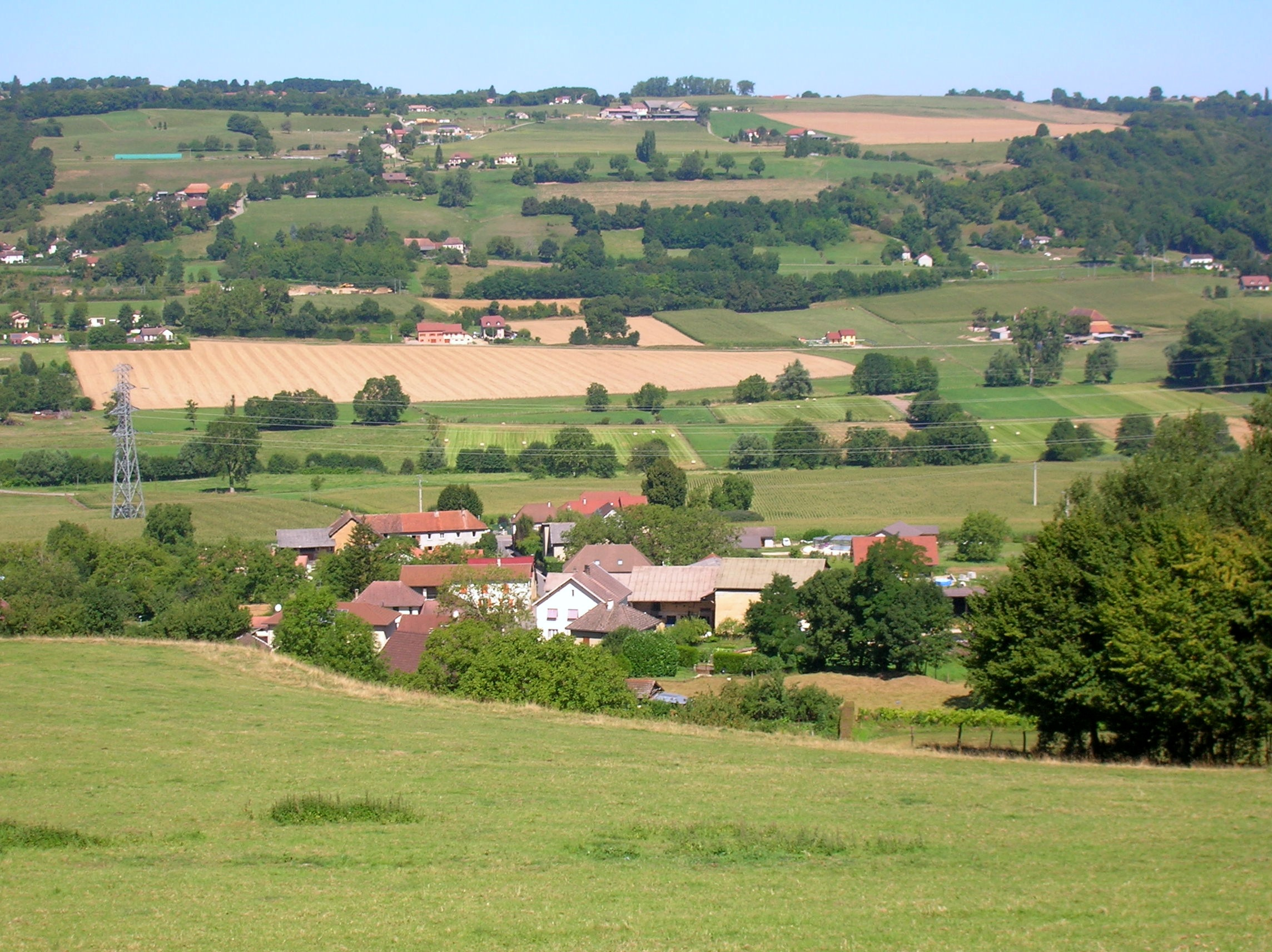 vue générale de Chassignieu, Isère, AuRA, France.